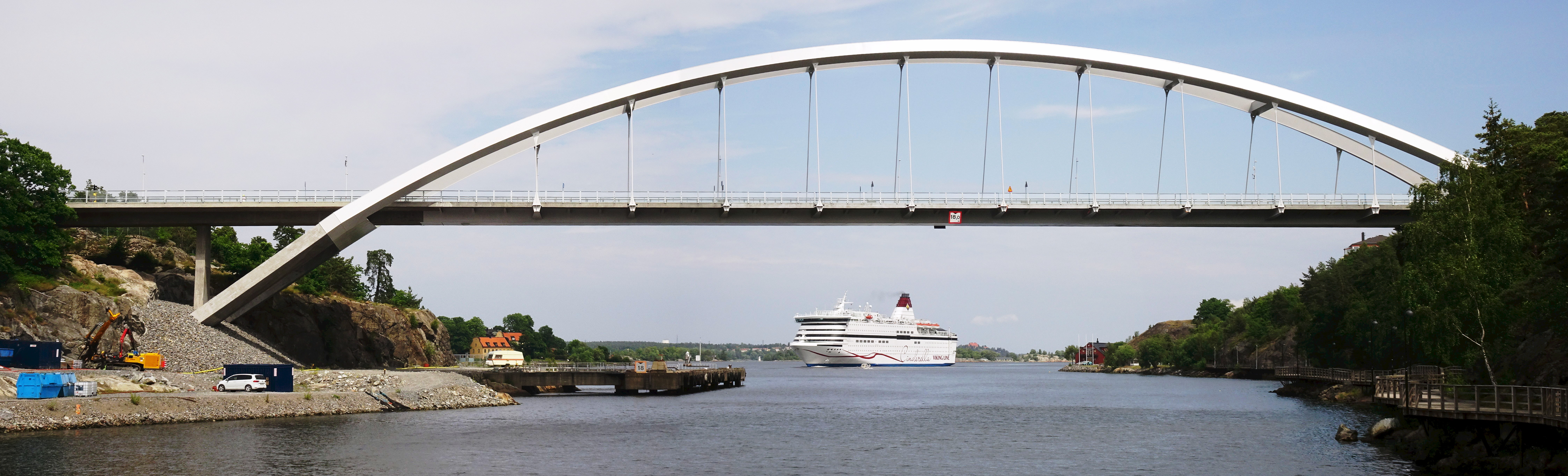 Svindersviksbron på dagen för trafiköppningen (21 juni 2016)